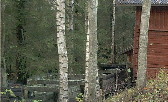 Kuvassa Suvisalmen myllyn veden juoksutuskouru vesiturbiiniin Nenättömänluomassa Nopankylässä.